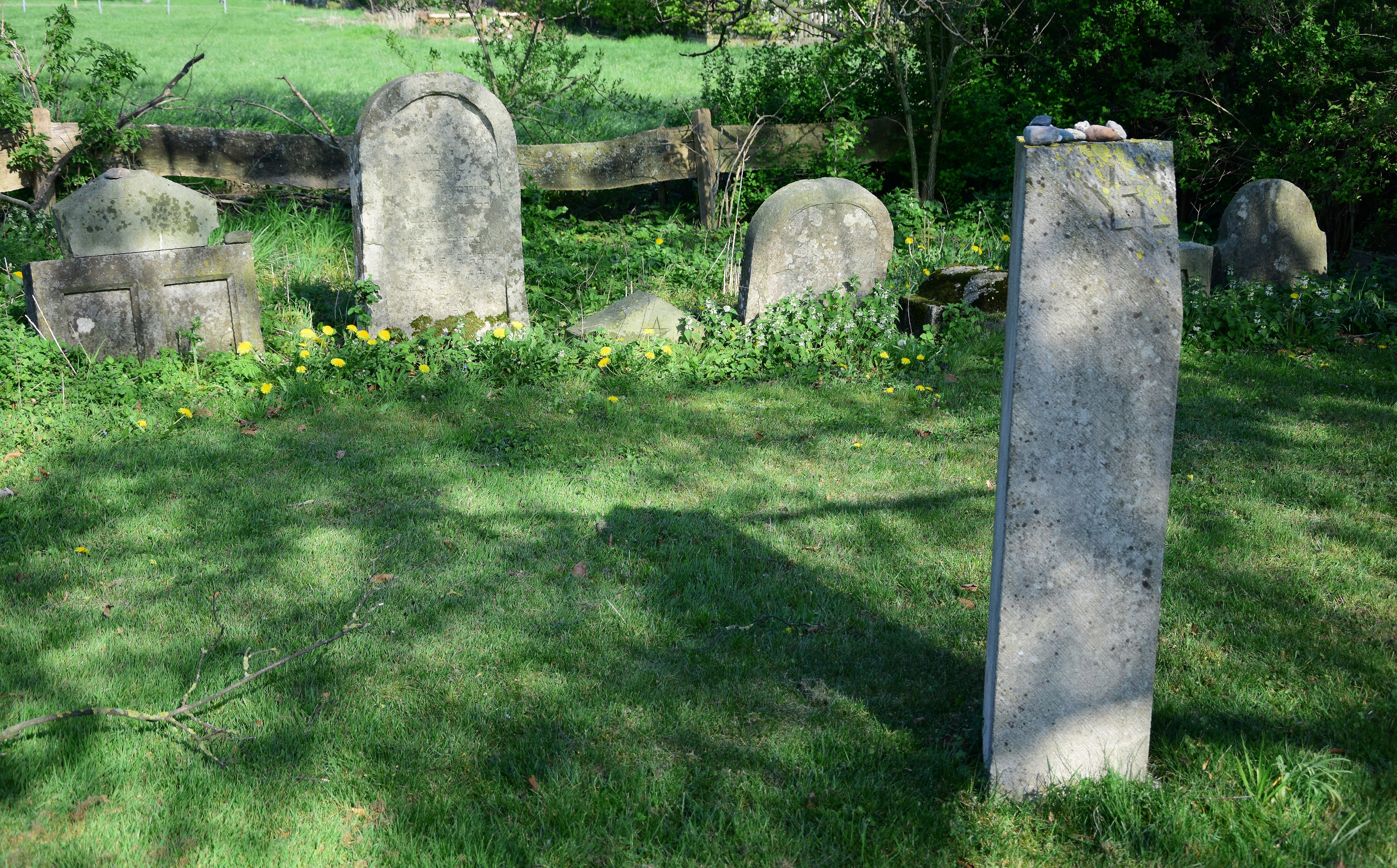 Denkmalgeschützter jüdischer Friedhof im Ortsteil Osterwick der Gemeinde Rosendahl